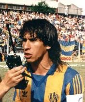 Bichi